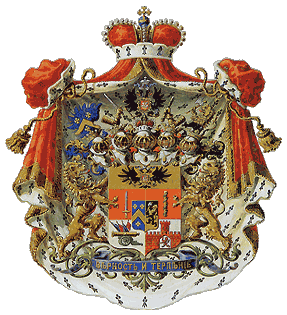 Герб князей Барклай-де-Толли-Веймарн